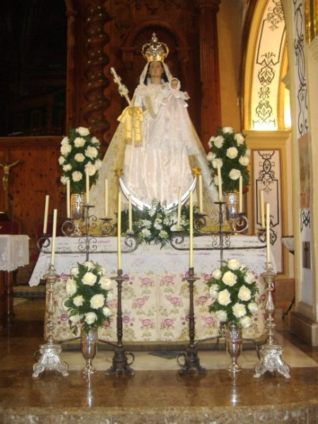 Nuestra Señora de Loreto de Algezares (Murcia) Spain